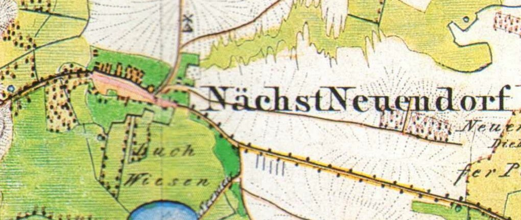 Nächst Neuendorf, Ortsteil der Stadt Zossen, Brandenburg, Deutschland, Ausschnitt aus dem Urmesstischblatt 1:25000 Blatt Zossen 3746 von 1840